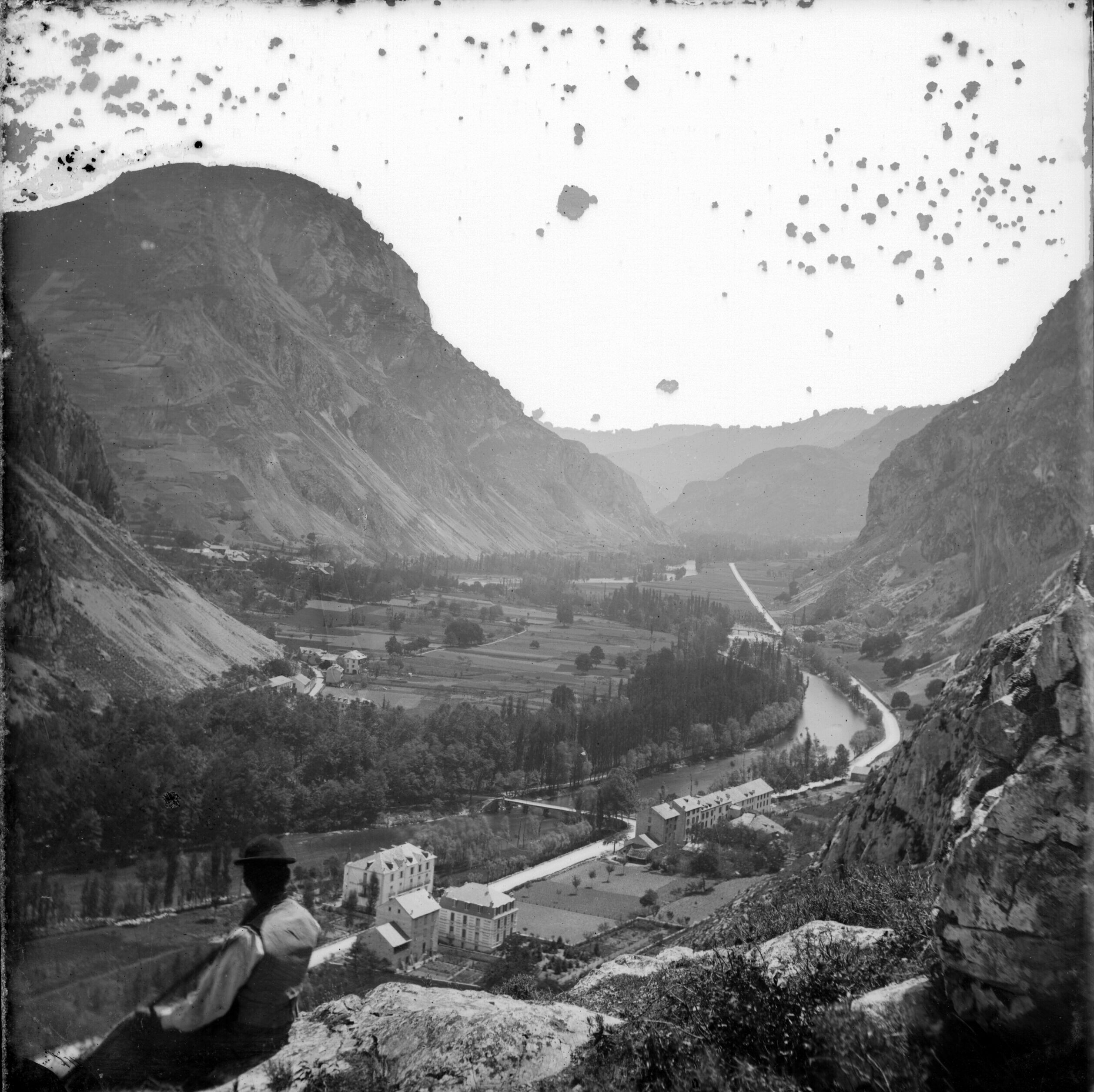 Fonds Trutat - Photographie ancienne Cote : TRU C 469 Localisation : Fonds ancien Original non communicable Titre : Ussat (Ariège) Auteur : Trutat, Eugène Rôle de l’auteur : Photographe Lieu de création : Ussat (Ariège) Date de création : 19e siècle, 4e quart Mesures : 9 x 9 cm Observations : plaque piquée Mot(s)-clé(s) : -- Montagne -- Village -- Bâtiment -- Cours d'eau -- Végétation -- Arbre -- Rocher -- Femme -- Ariège (Midi-Pyrénées) -- Ussat (Ariège) -- 19e siècle, 4e quart Médium : Photographies Médium : Positifs sur plaque de verre -- Noir et blanc -- Collodion albuminé -- Paysages Bibliothèque de Toulouse. Domaine public